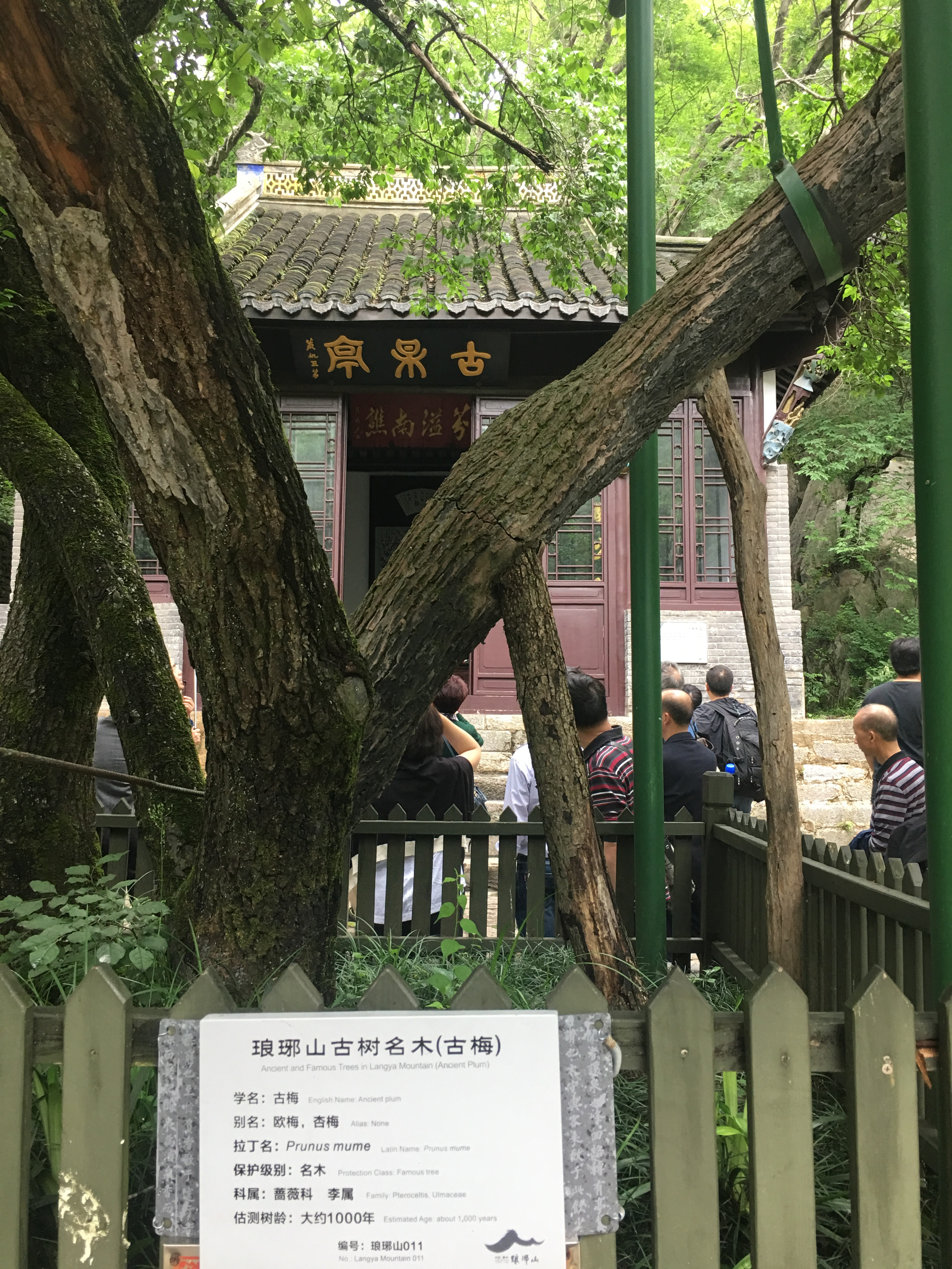 中文（中国大陆）: 我母亲代拍的古梅亭